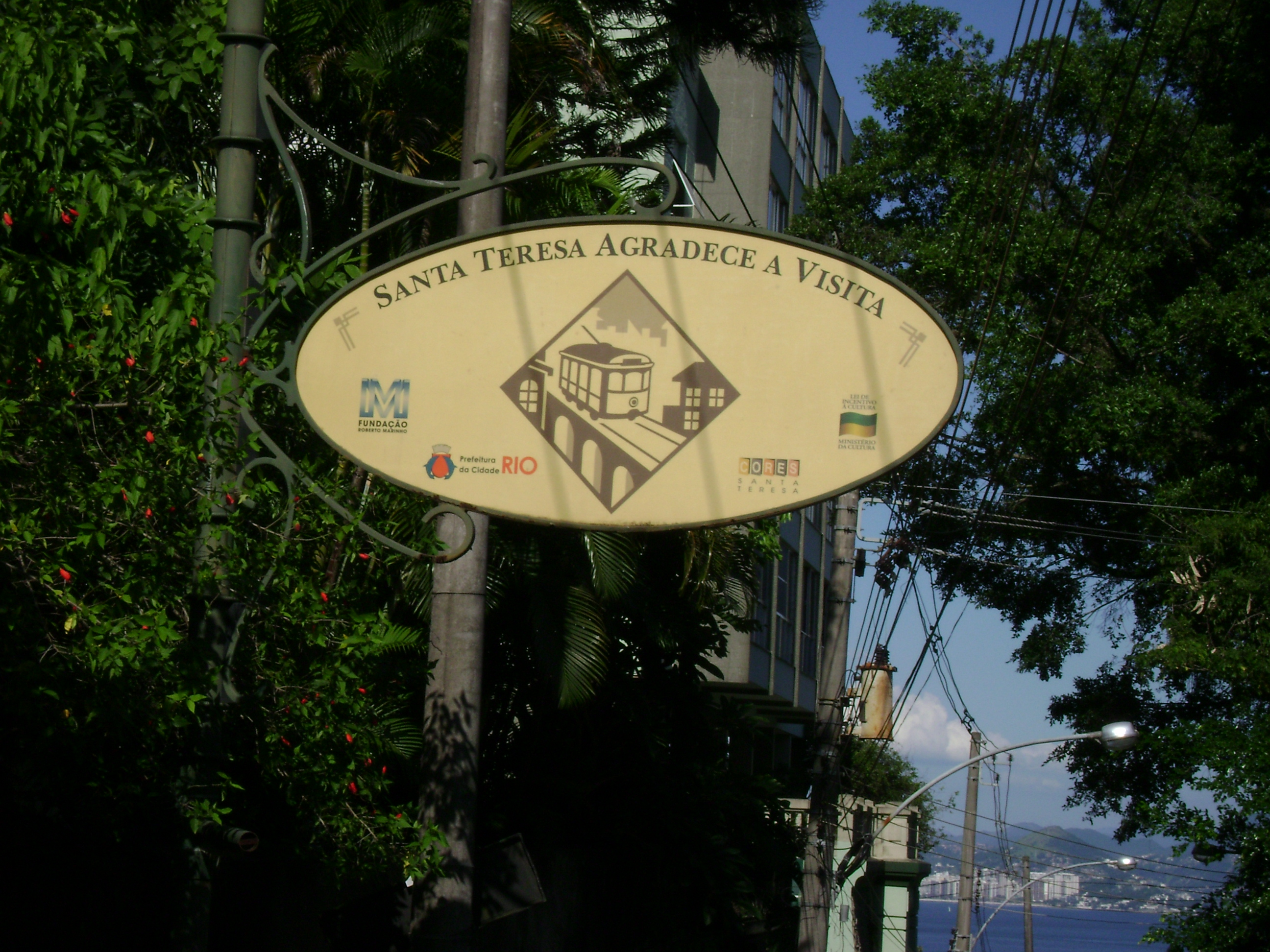 Placa no bairro de Santa Terasa, na cidade do Rio de Janeiro, Brasil.